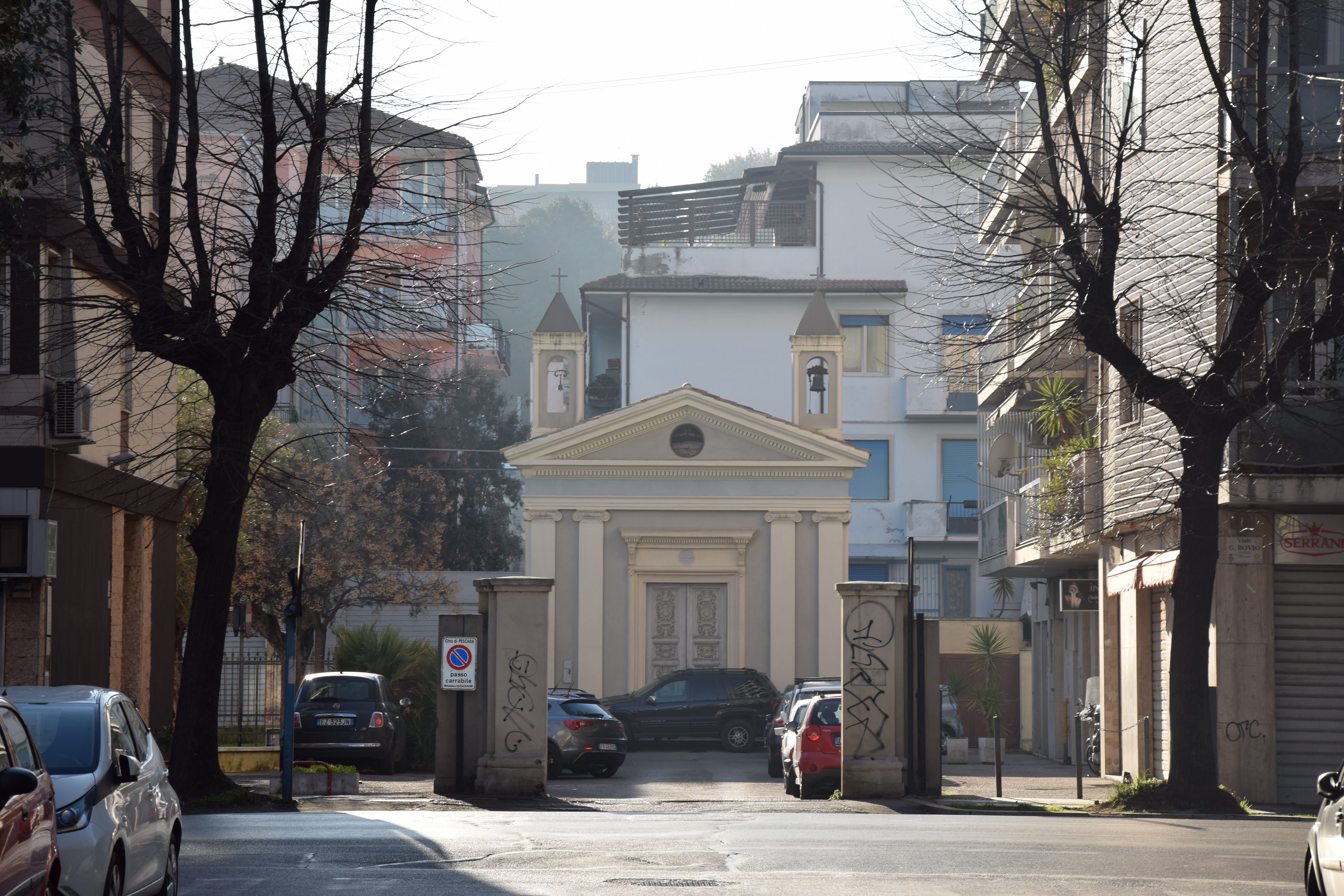 la cappella di sant'anna a villa muzii pescara